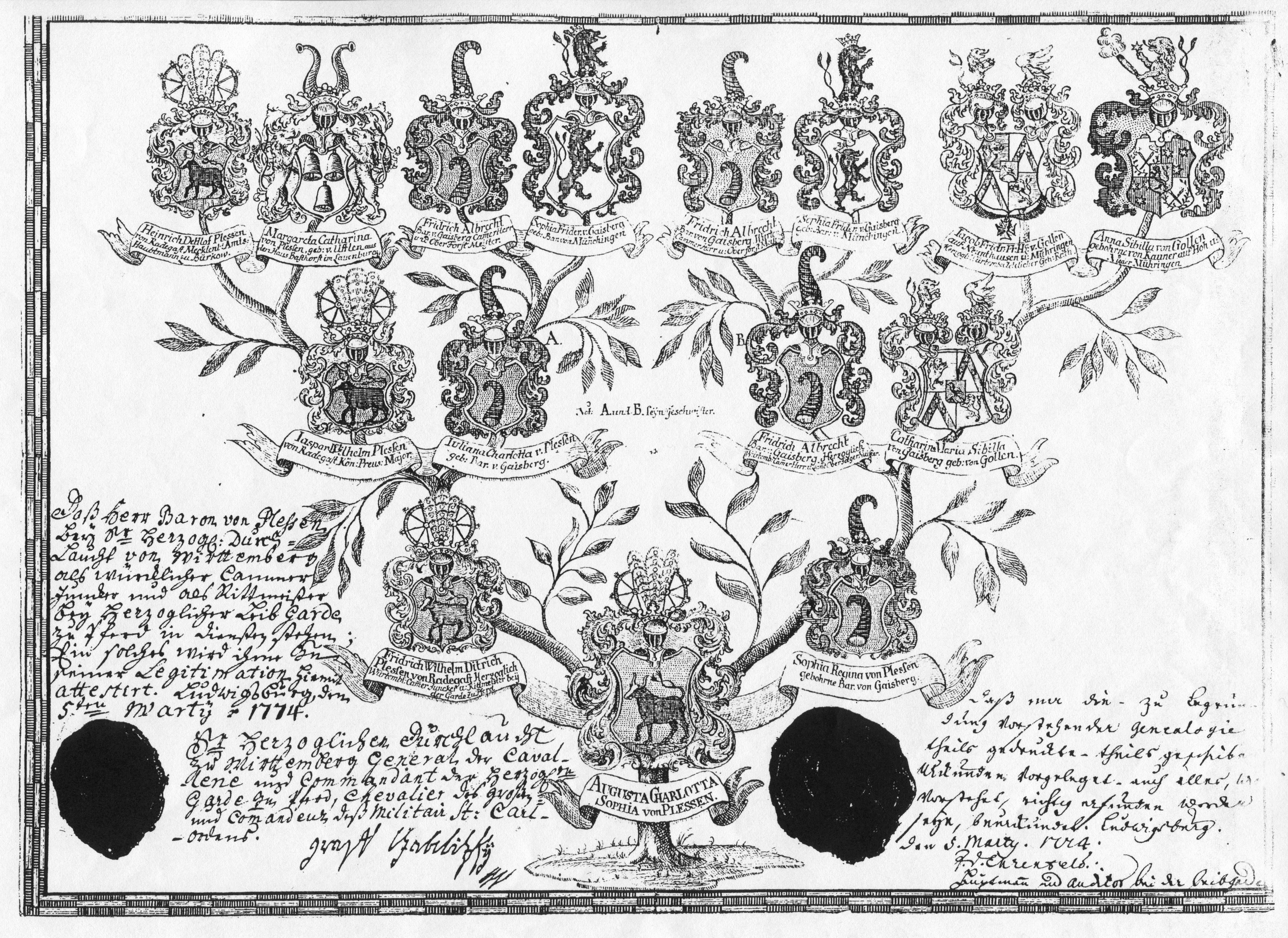 Ahnentafel / Ahnennachweis für Augusta Charlotta Sophia von Plessen (1772-1840), (Württembergische Linie der Plessen)